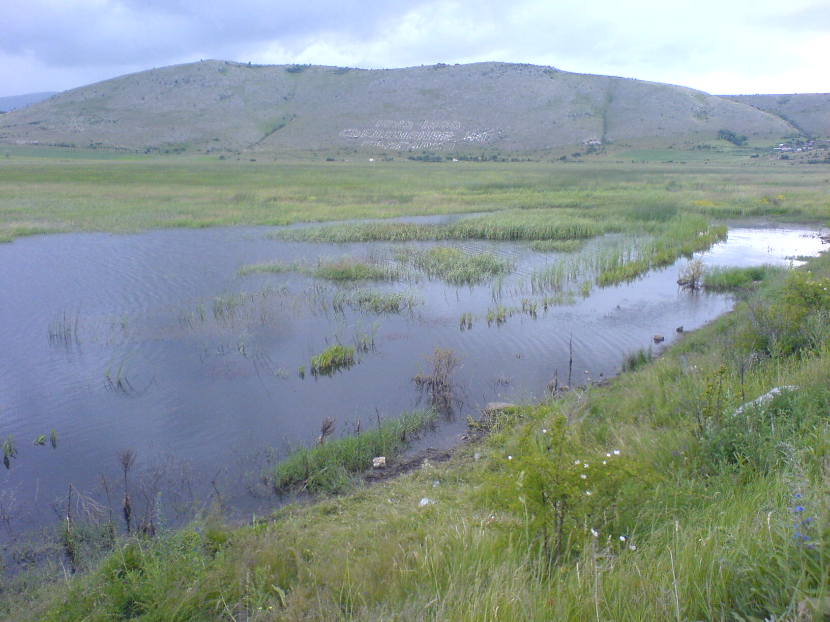 Алдомировско блато и част от местността "Камик", с надпис "Съединение на България 1885-1985", поставен в чест на 100 годишнината от Съединението на България (Aldomirovtsi marsh, near Slivnitsa, Bulgaria) Autor:Biser Todorov